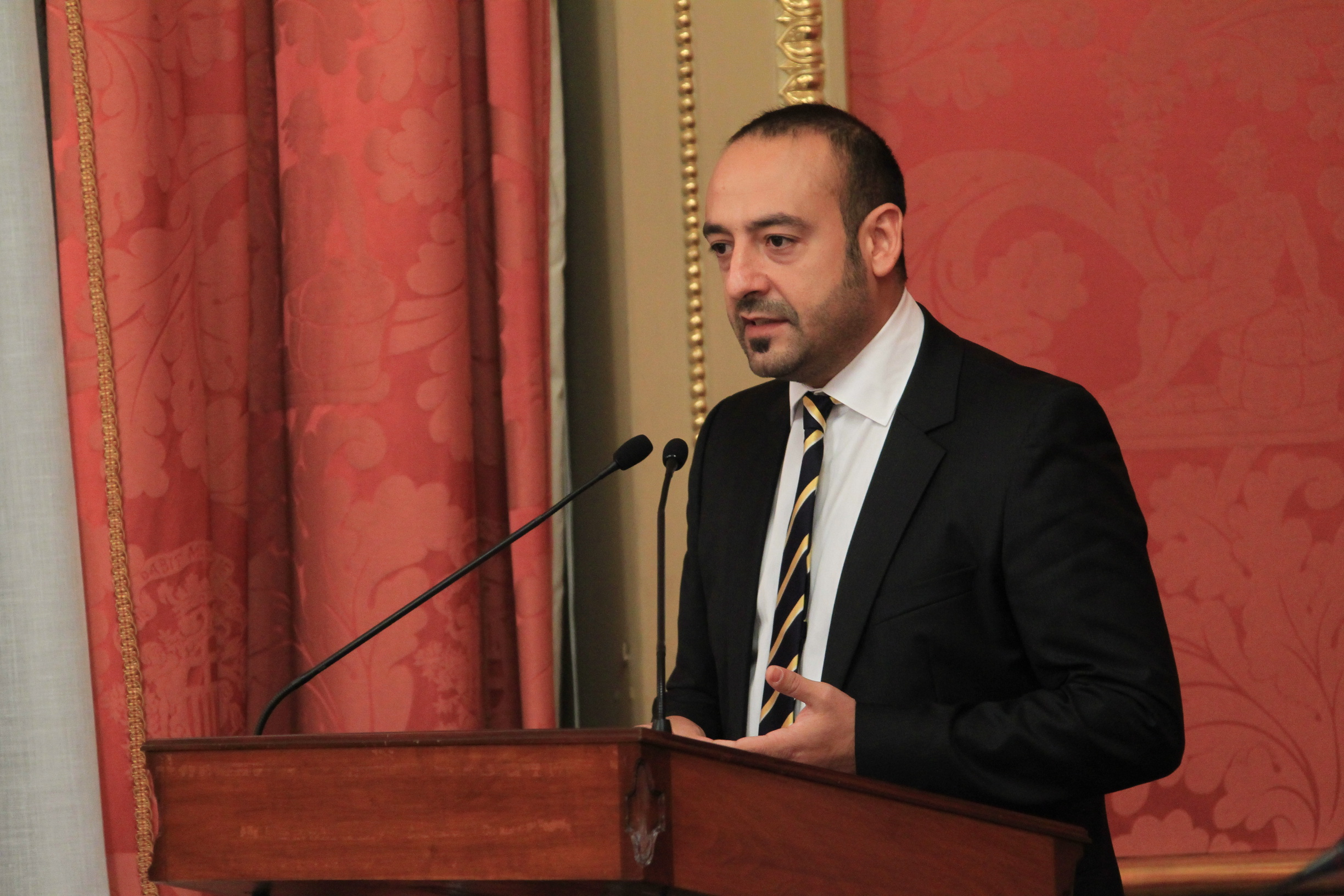 Jordi Cañas, portaveu de Ciutadans intervè en l'esmorzar electoral de la Cambra a Casa Llotja.